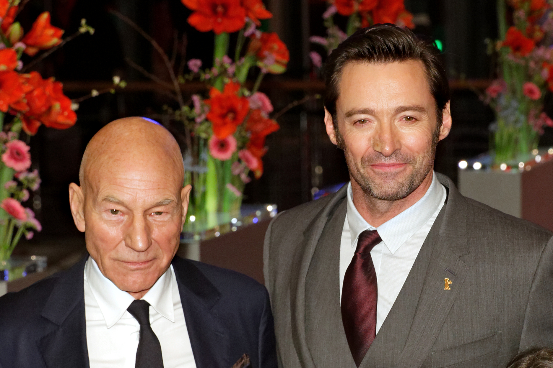 Patrick Stewart und Hugh Jackman bei der Weltpremiere von Logan bei der Berlinale 2017